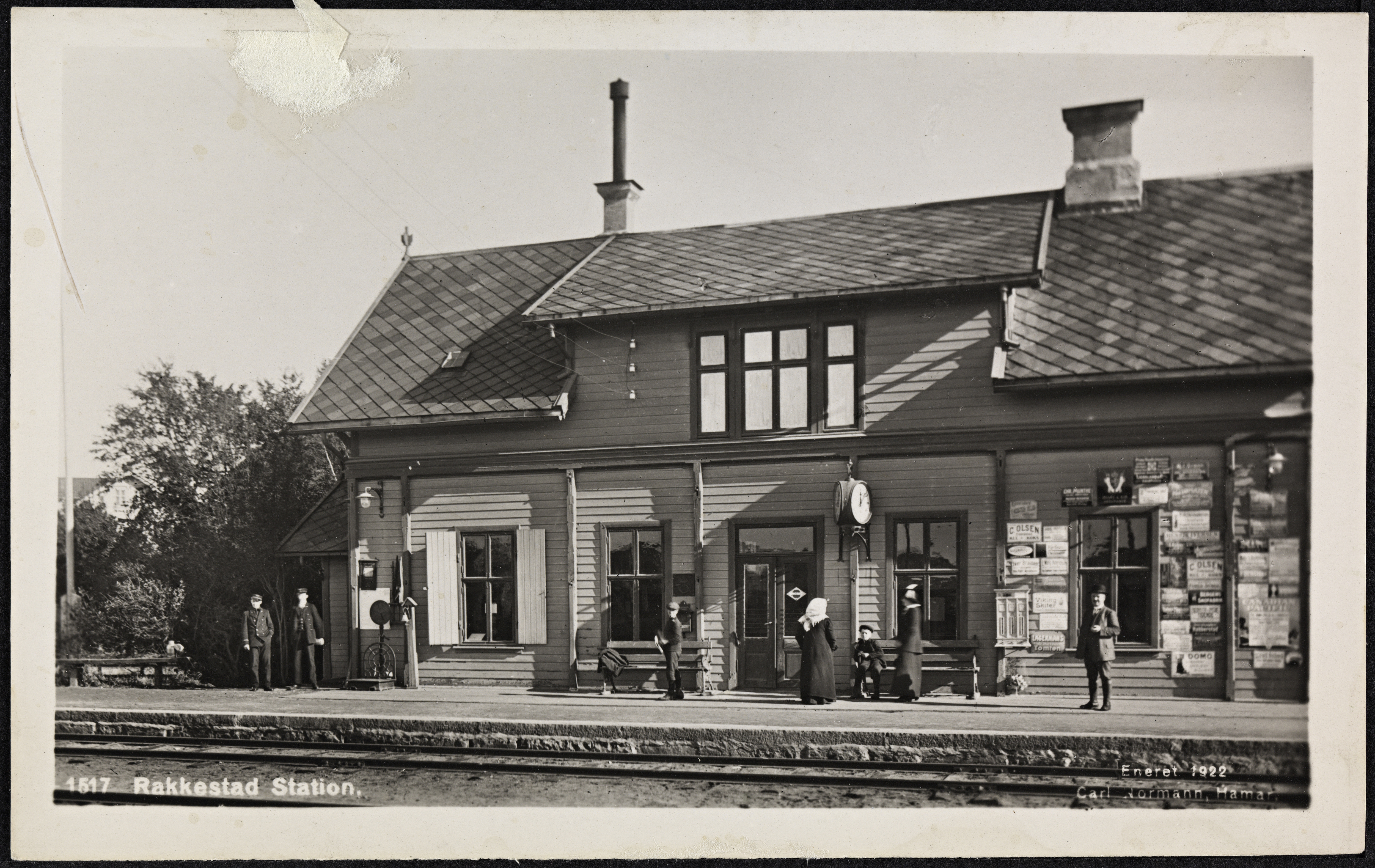 Dato / Date: utgitt 1922 Sted / Place: Rakkestad, Østfold Fotograf / Photographer: Carl Normann Digital kopi av original / Digital copy of original: sv/hv postkort, sølvgelatin Eier / Owner Institution: Nasjonalbiblioteket / National Library of Norway Lenke / Link: Bildesignatur / Image Number: bldsa_PK30790